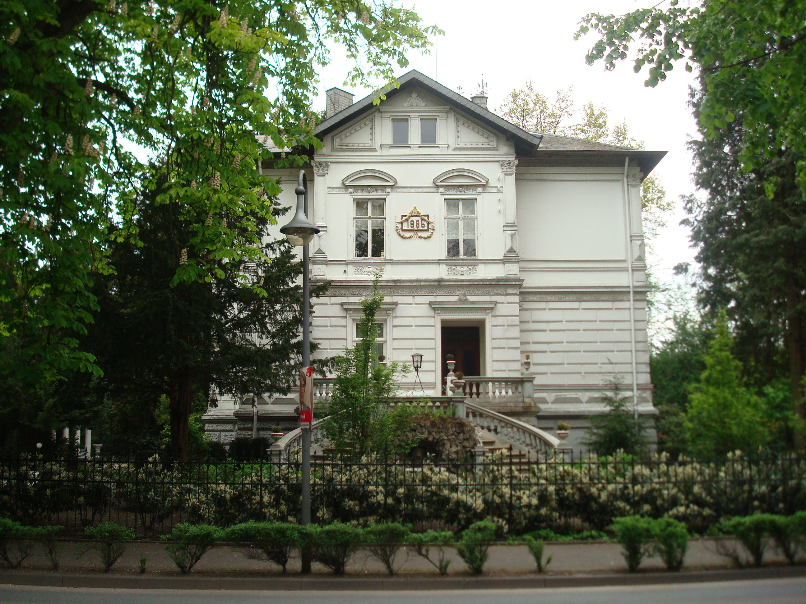 Fabrikantenvilla in Gütersloh-Isselhorst gegenüber der Brennerei Elmendorf This is a photograph of an architectural monument. 049